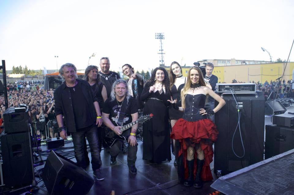 Symfobia